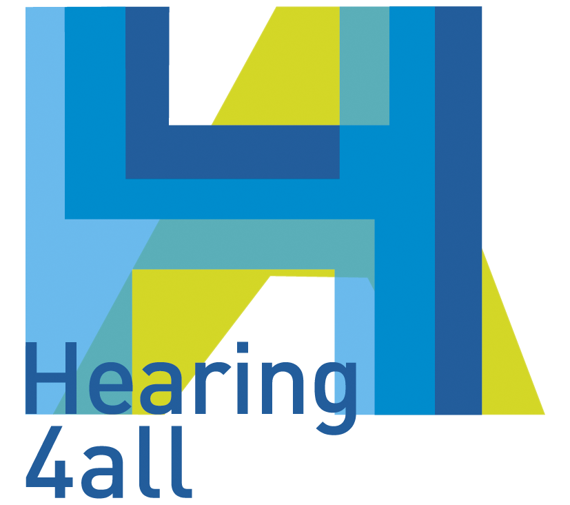 Exzellenzcluster Hearing4all